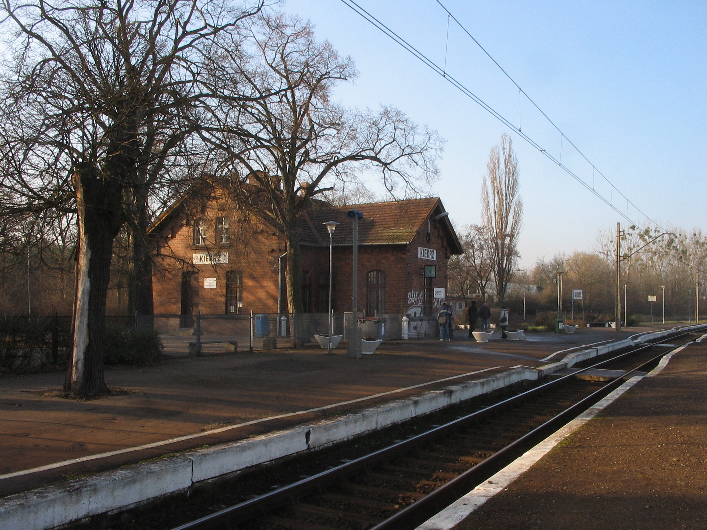 budynek stacyjny stacji Kiekrz - widok z peronu